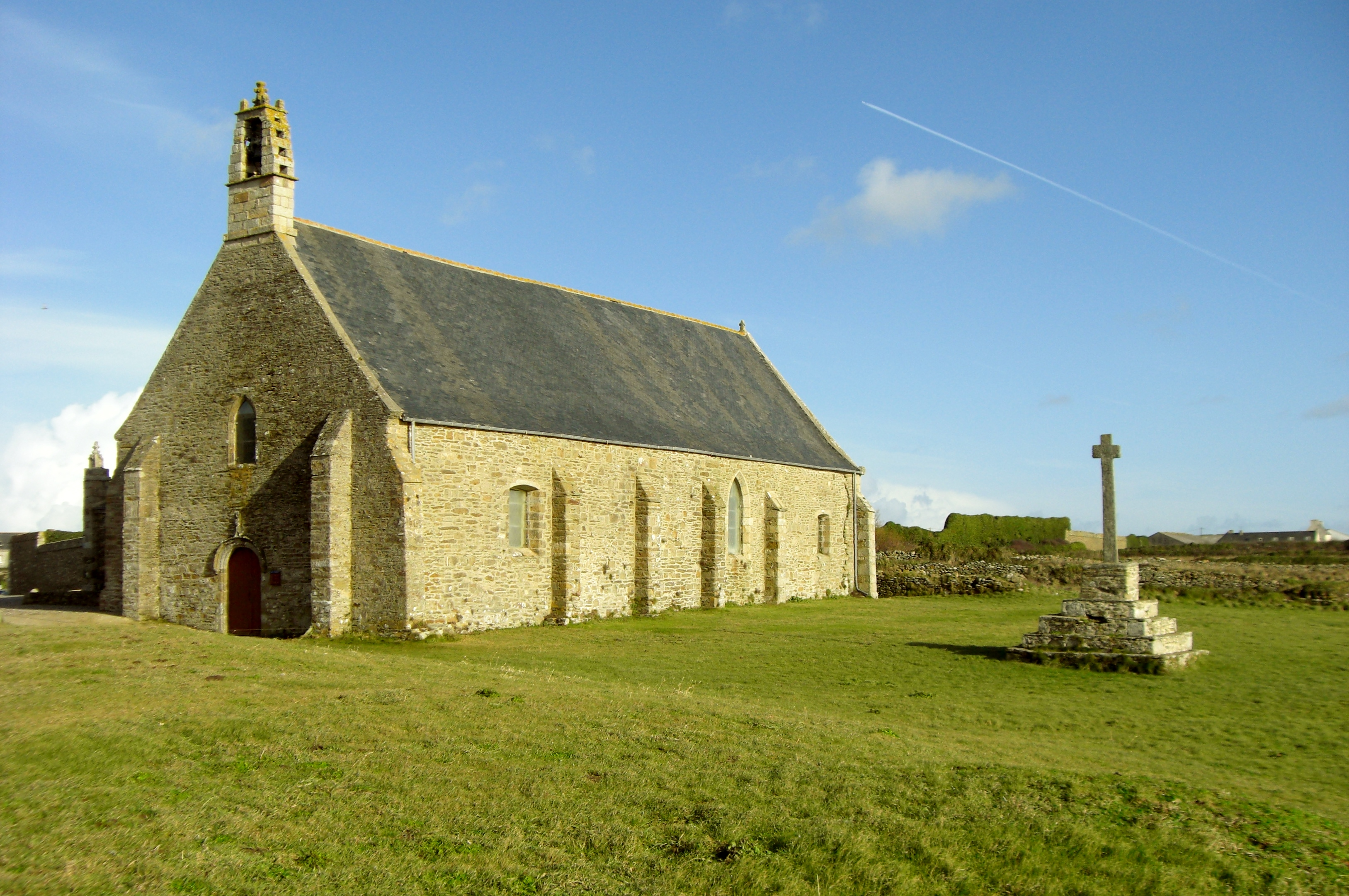 Plougonvelin : la chapelle Notre-Dame de Grâce à la pointe Saint-Mathieu, ancien église paroissiale de la trève de Saint-Mathieu Fin de terre